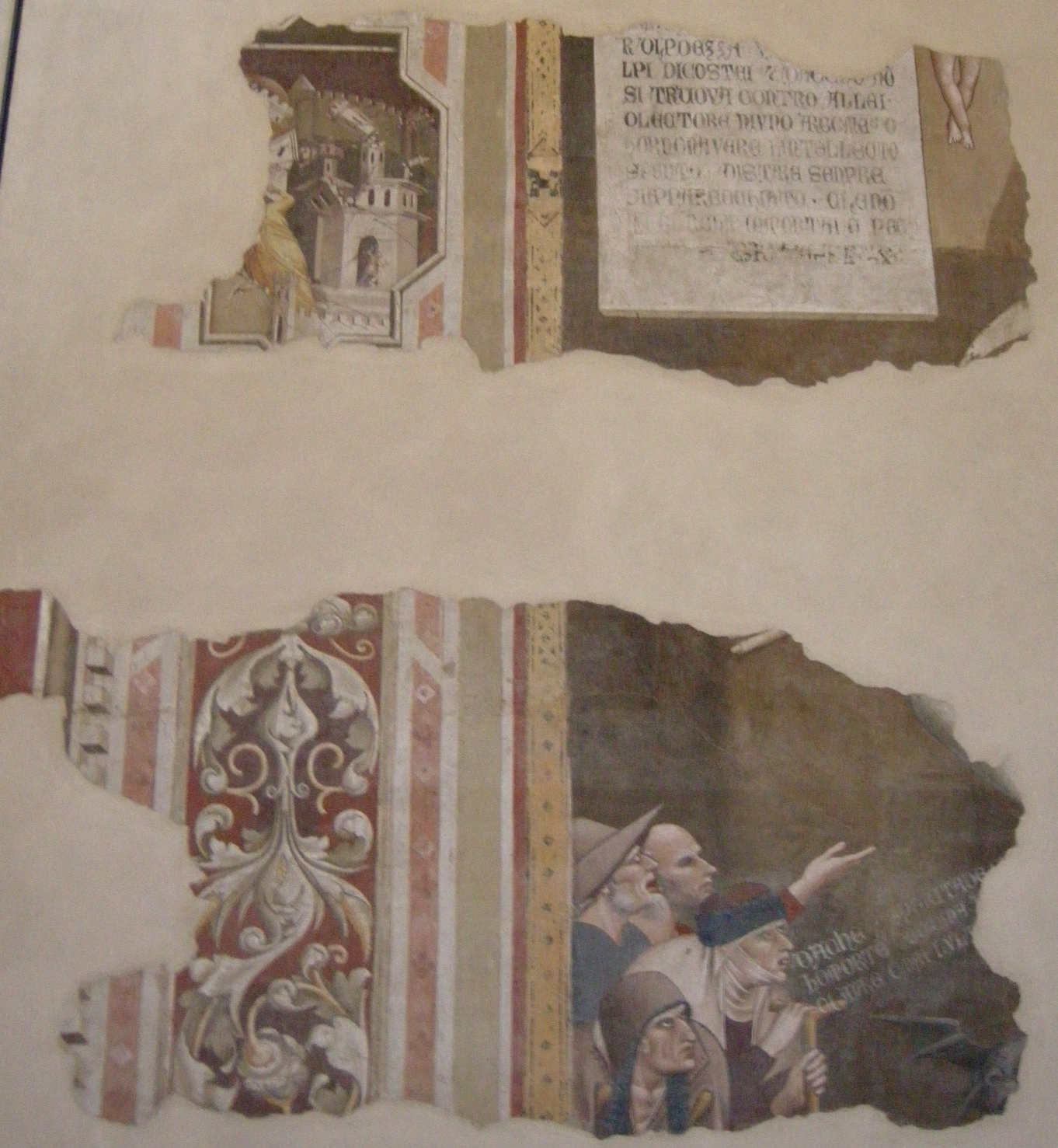 Refettorio santa croce, frammento di andrea orcagna